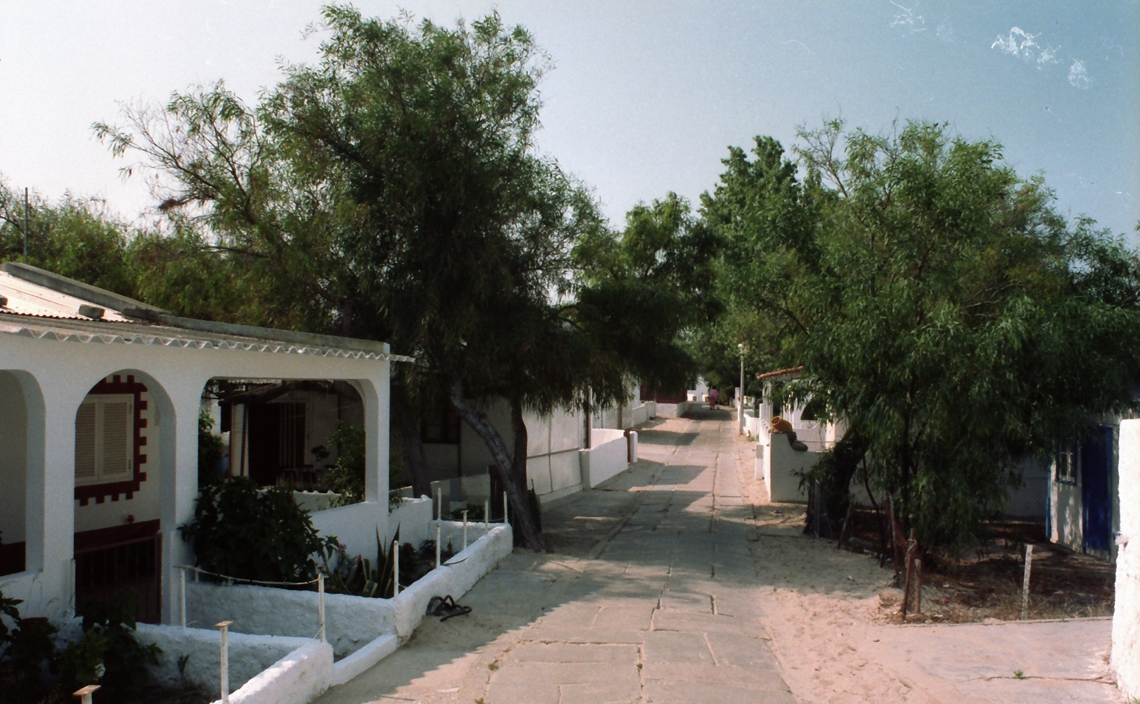 Portugal - Algarve: Ilha da Armona vor Olhão, Hauptweg